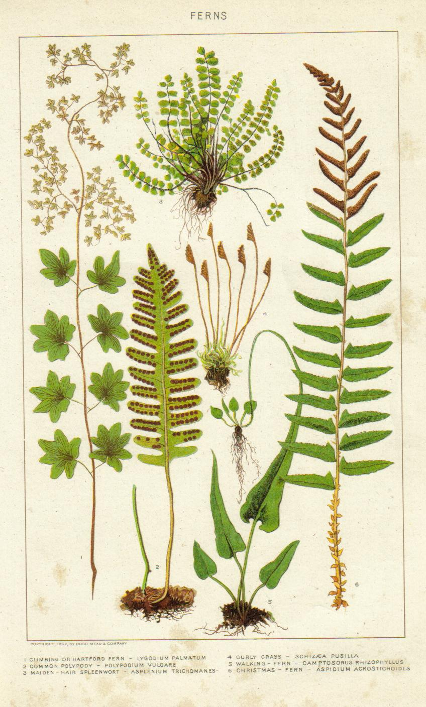 Painting